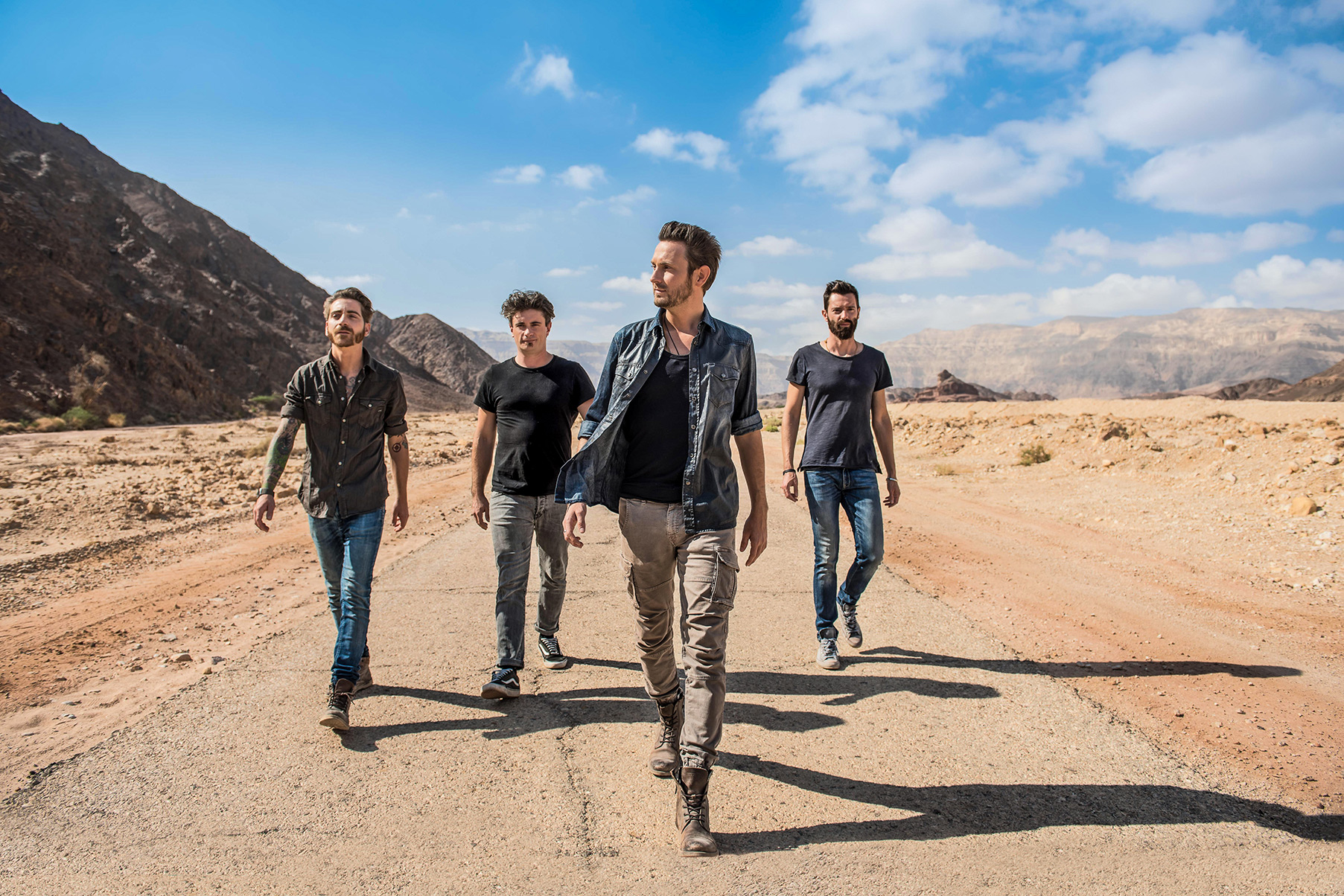 Immagine rappresentativa della rock band italiana The Sun.